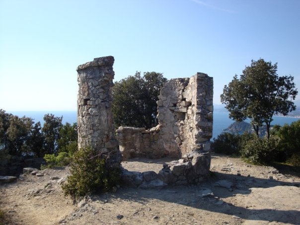 Torre saracena di Punta Manara This is a photography of Natura 2000 protected area with ID IT1333308